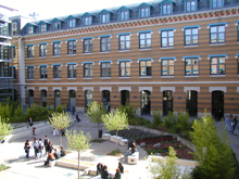 IAE Lyon Manufacture des Tabacs